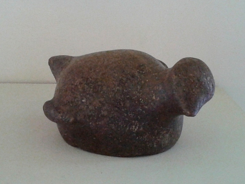 Português do Brasil: Zoólito em forma de ave. Acervo de arqueologia brasileira do Museu Nacional/UFRJ, Rio de Janeiro, Brasil.